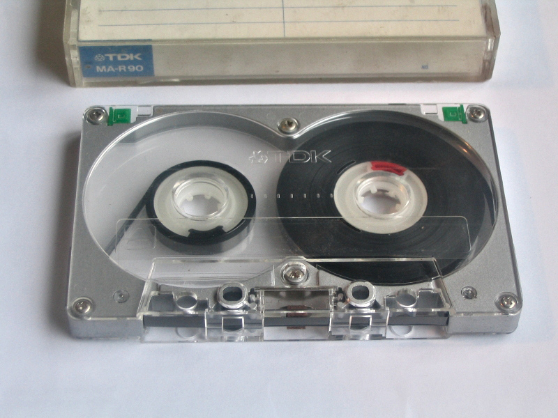 TDK MA-R C90 cassette biedt de hoogste kwaliteit